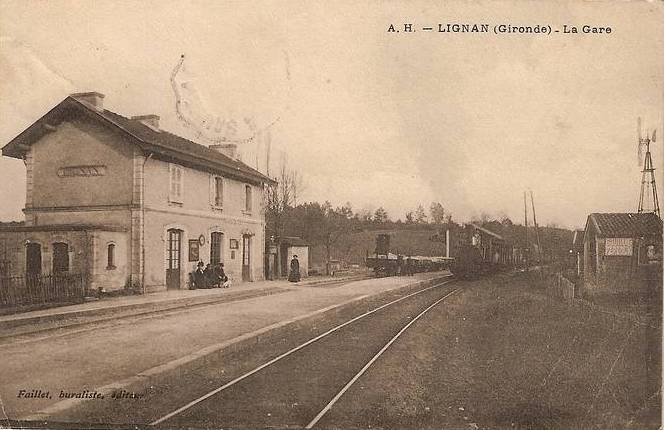 Lignan on post-cards